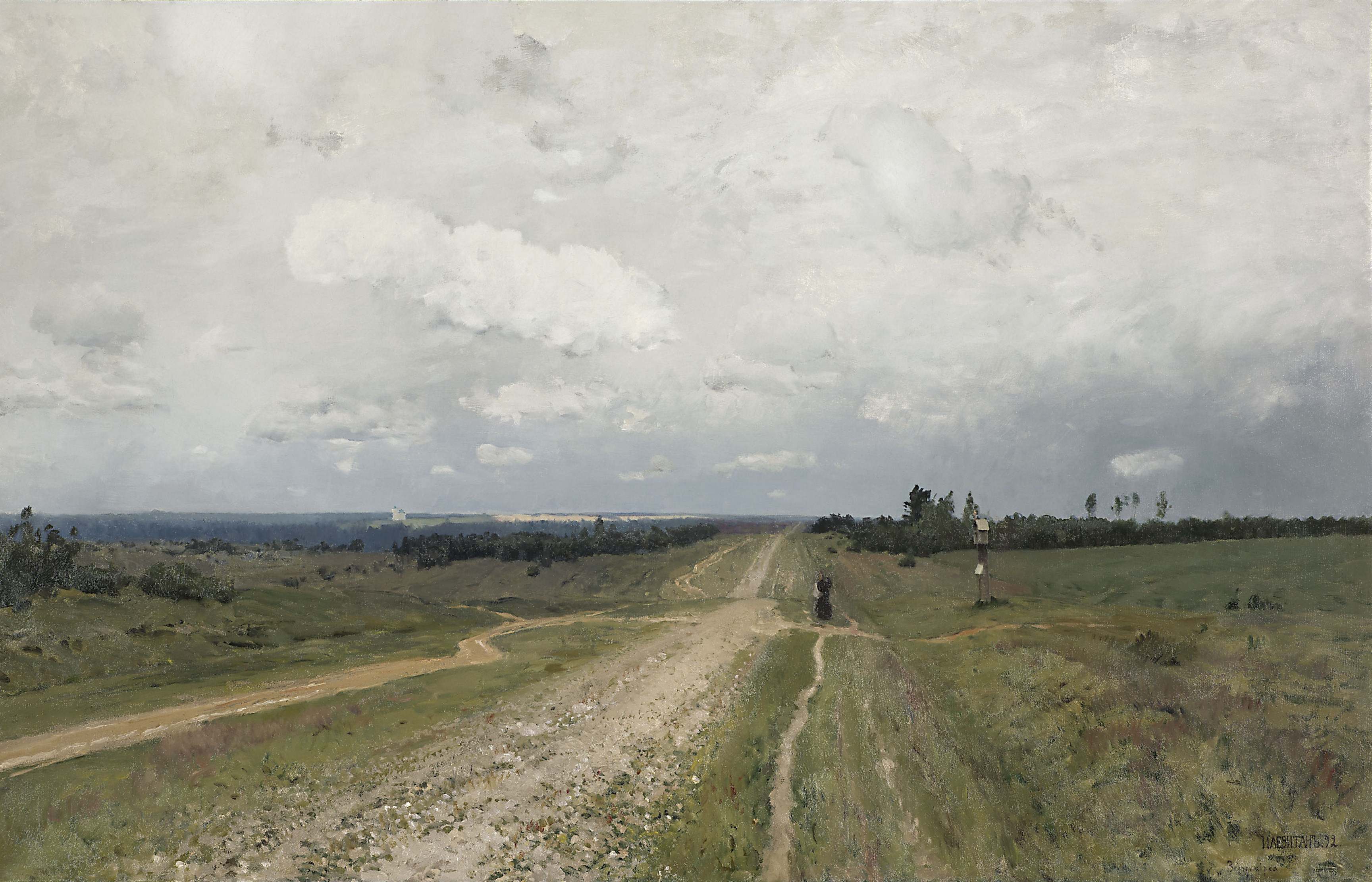 Левитан. Владимирка. Версия без рамки.